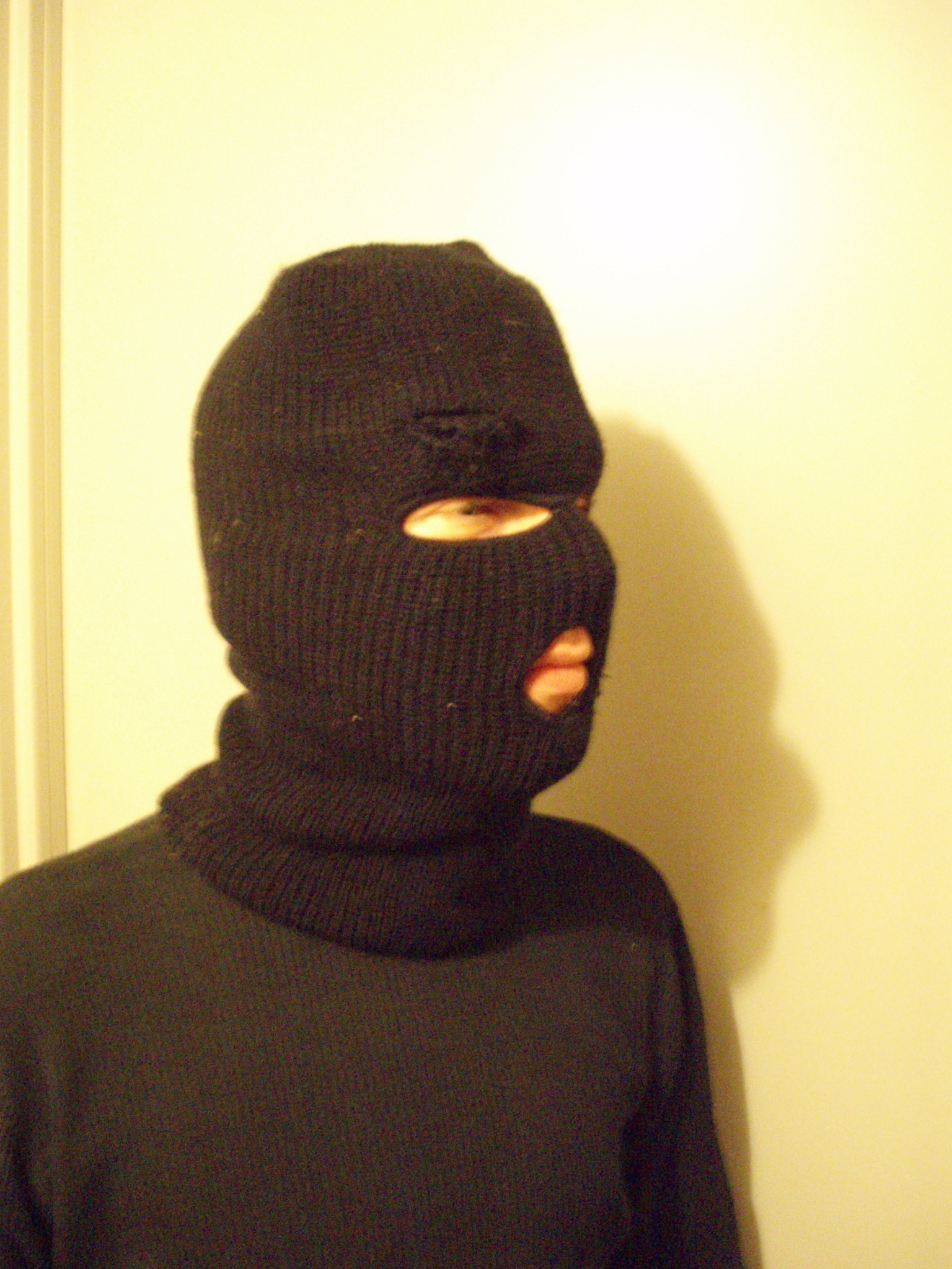 eigen foto 2006 (c) looi